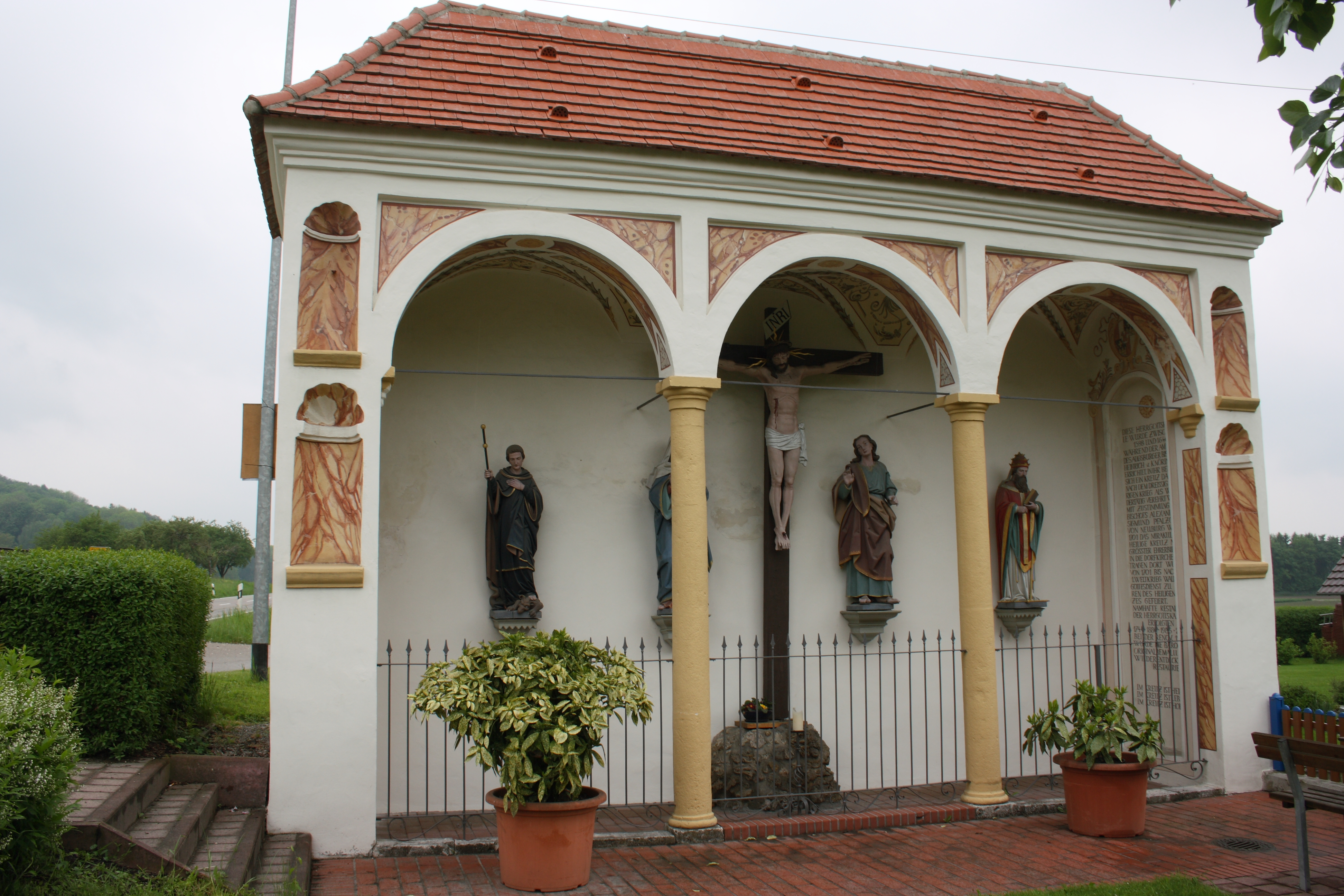 Herrgottskapelle in Weisingen, einem Ortsteil von Holzheim im Landkreis Dillingen an der Donau, 1. Hälfte 18. Jahrhundert, an der Straße nach Aislingen